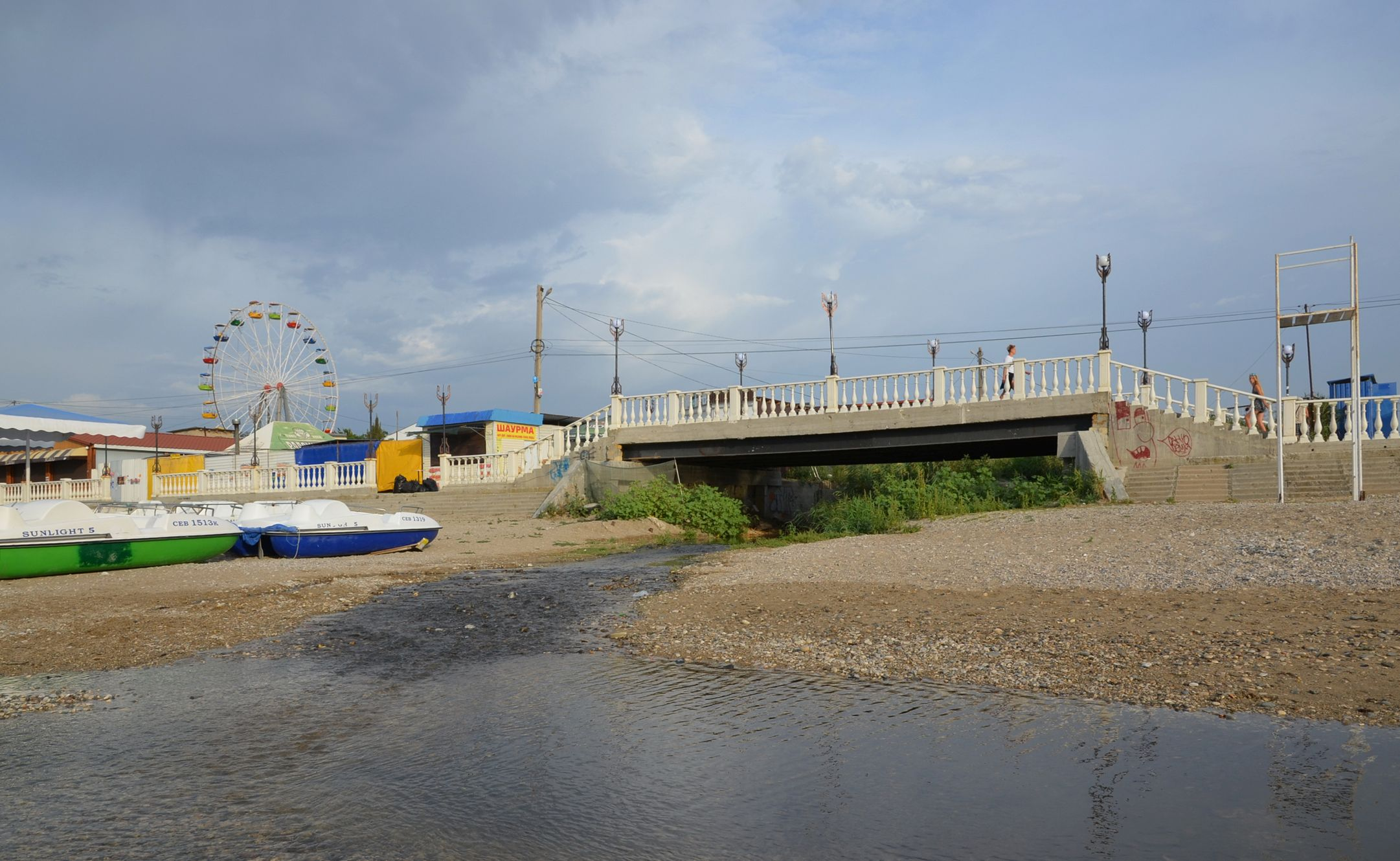 Устье реки Янтык, Крым.